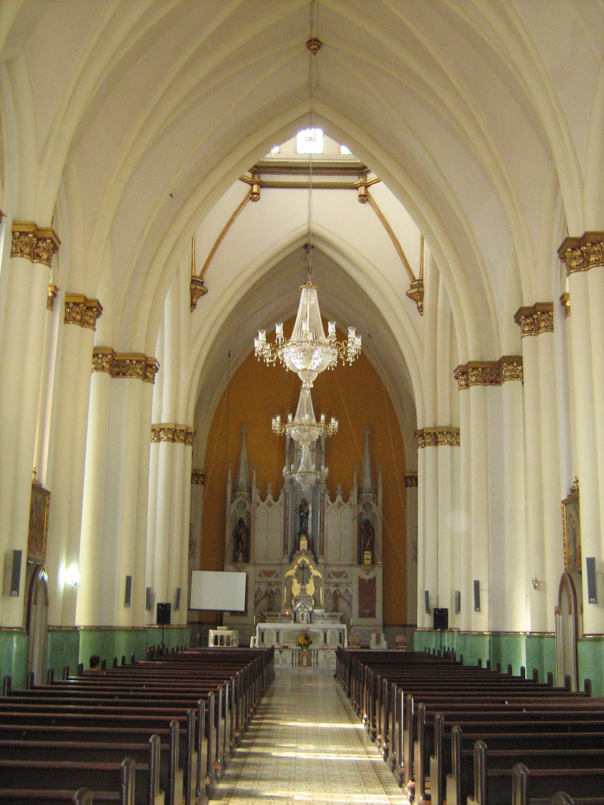 Iglesia de Nuestra Señora del Sagrado Corazón, Medellín, Colombia